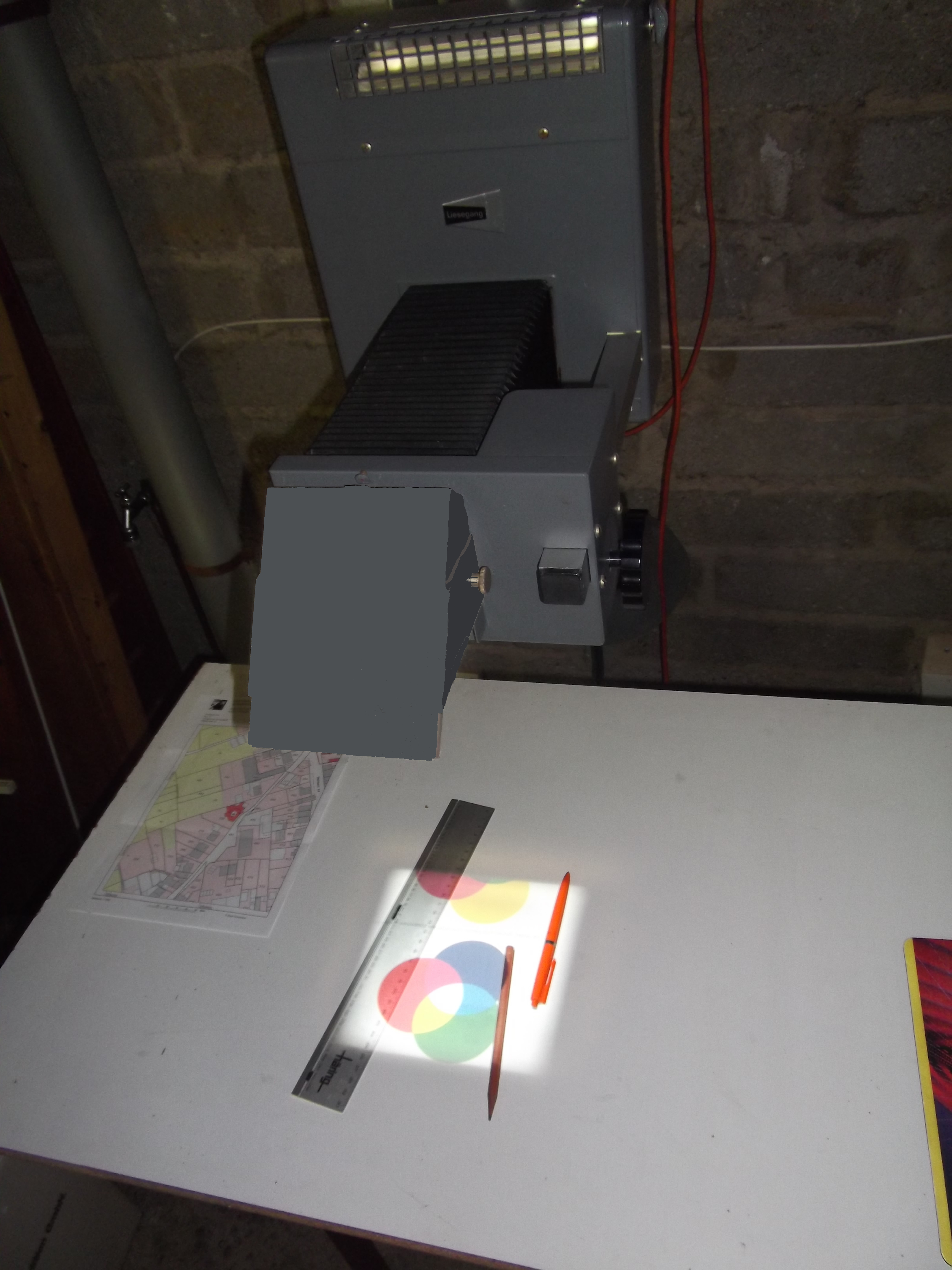 Episkop, Zeichenepiskop, Liesegang Typ Antiskop 505. Auf vertikaler Säule als Höhenverstellung, Vergrößerung 0,5 bis 10 fach. Metalldampflampe 400W, Sockel Fc2.